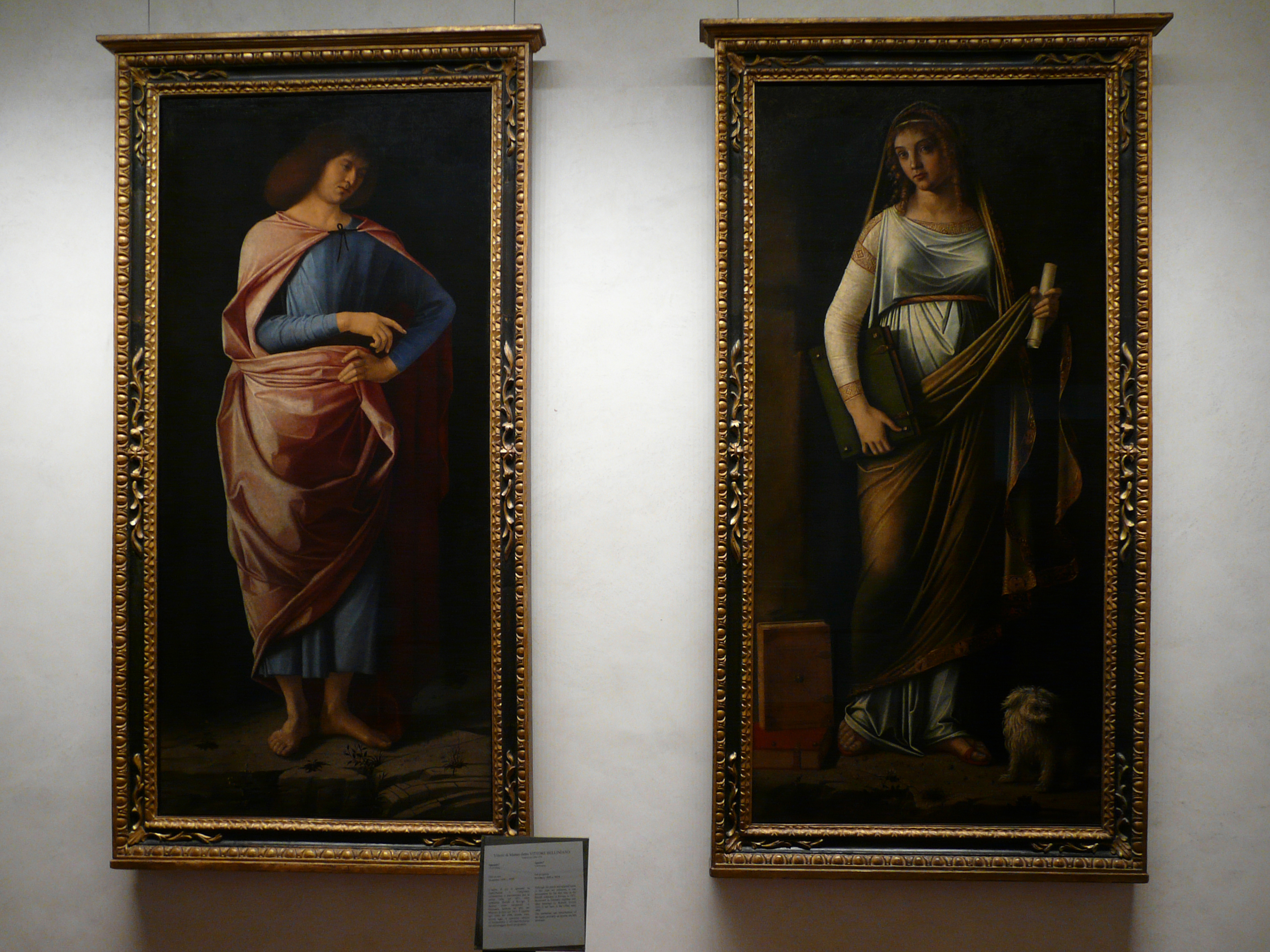 Витторе Карпаччо. Профета и Сибилла